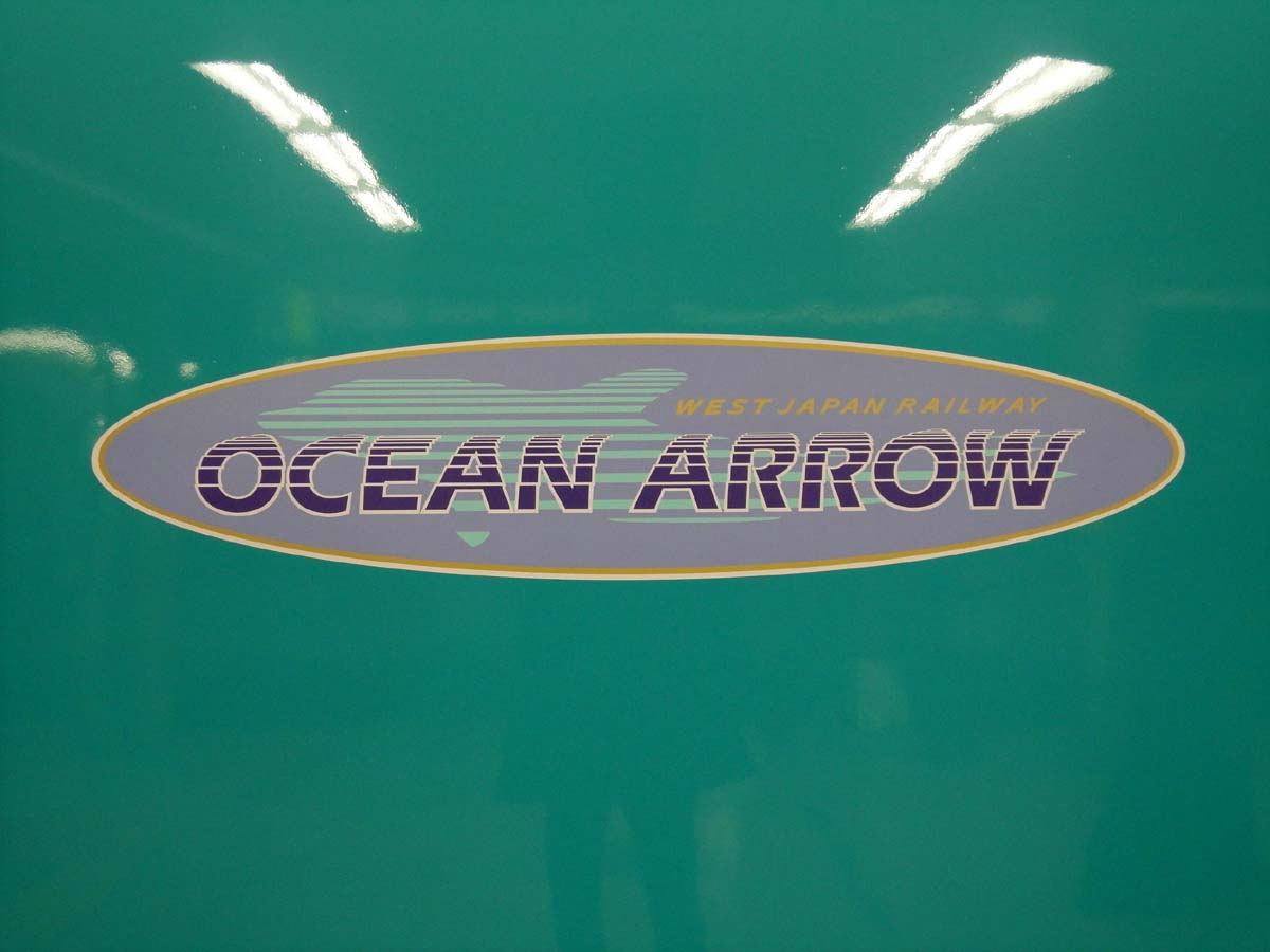 JR西日本283系 ロゴマーク